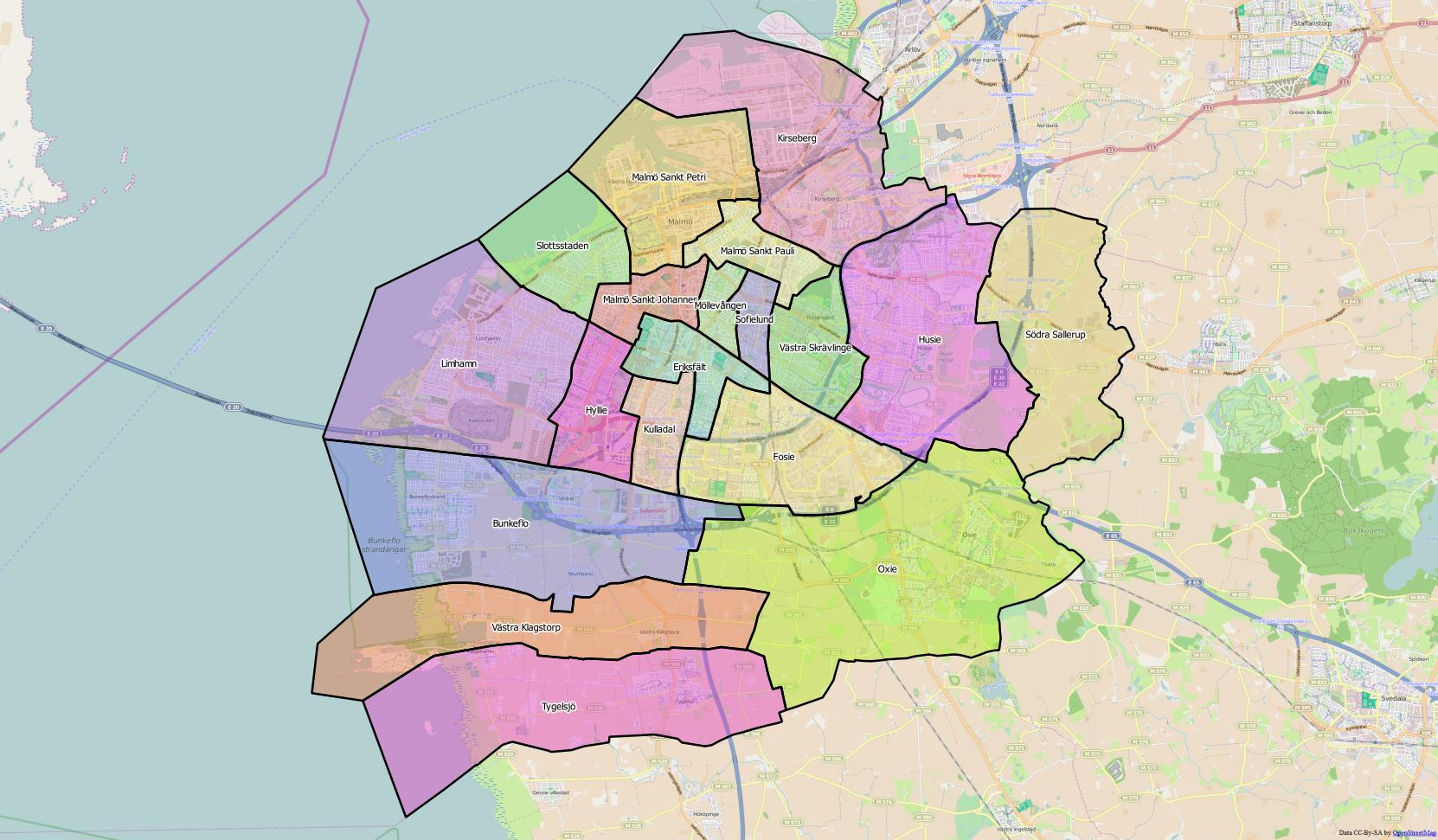 Distriktsindelningen i kommunen.